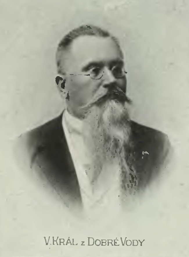 Portrét – Vojtěch Král z Dobré Vody (1844-1913), Český heraldik, sfragistik a cvičitel Sokola.